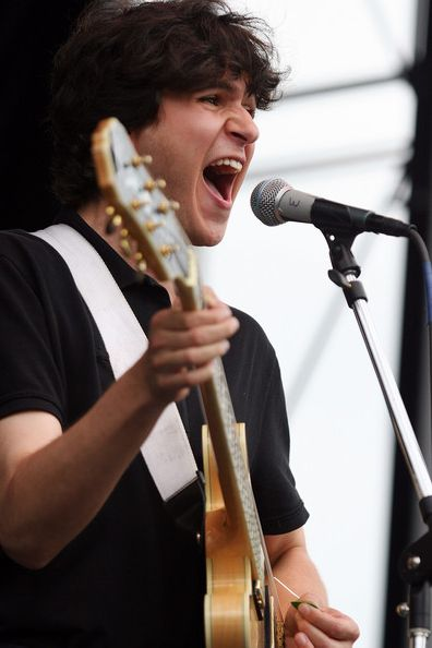 Ezra Koenig